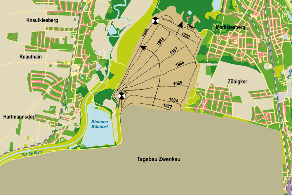 Darstellung der zeitlichen Entwicklung des Tagebaus Cospuden